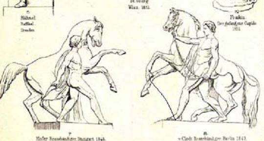 Bild aus Meyerslexikon